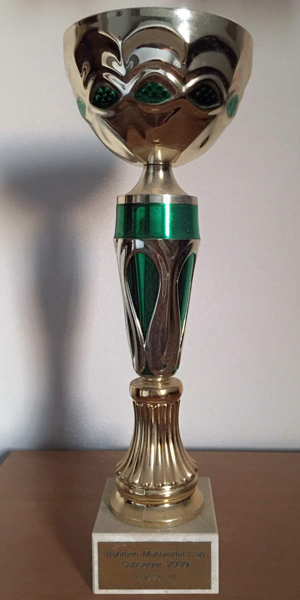 Pohár vítěze M tříty